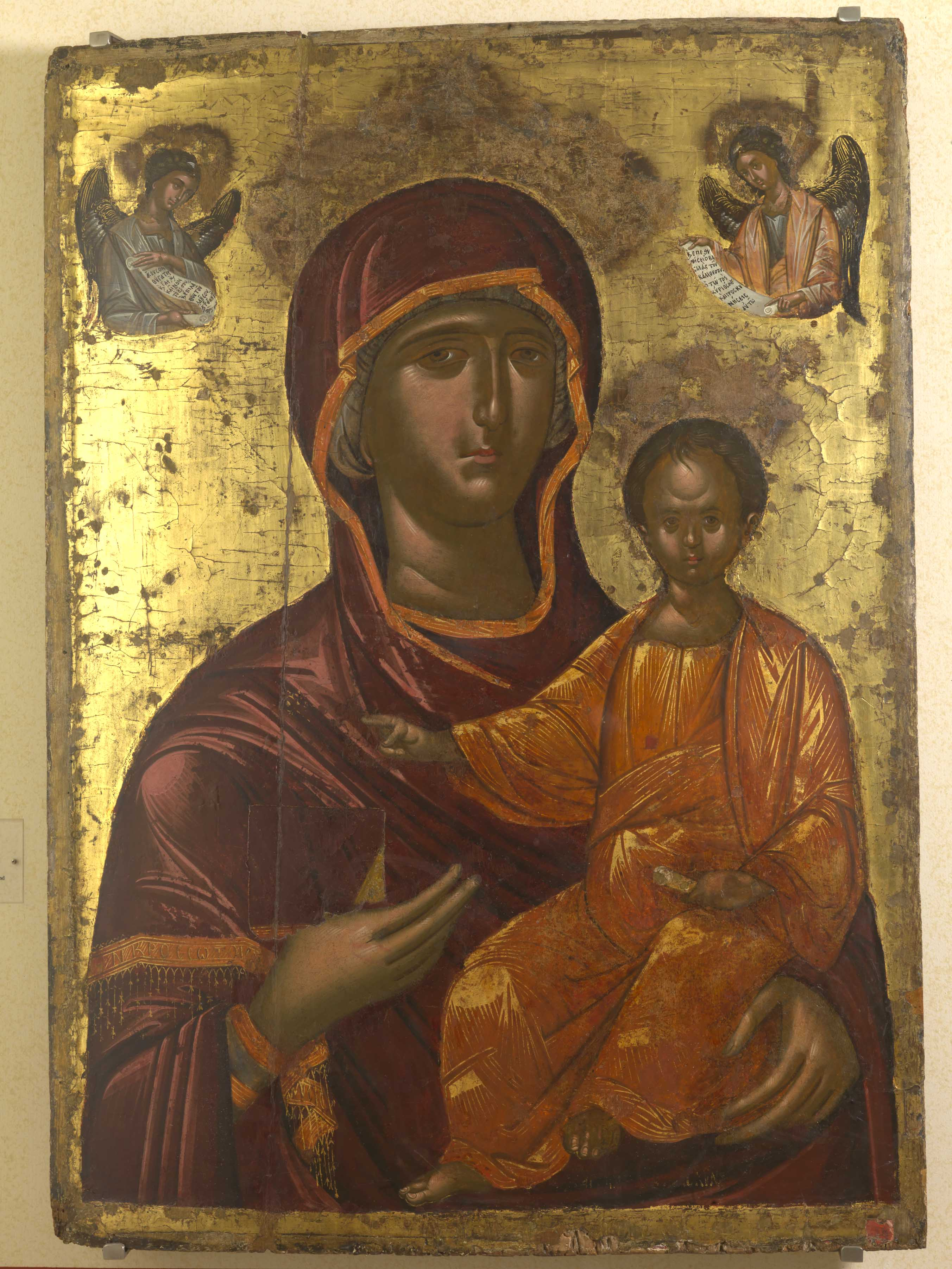 Παναγία Οδηγήτρια τέλη 16ου αιώνα (1574-1582), 79x111εκ. Μιχαήλ Δαμασκηνός "Ψαλμός Μδ΄, 11-12" Η Παναγία εικονίζεται μετωπική να κρατεί τον Χριστό στο αριστερό της χέρι και να δέεται προς αυτόν με το δεξί μπροστά στο στήθος. Ο Χριστός, επίσης μετωπικός, ευλογεί με το δεξί χέρι και κρατεί τυλιγμένο ειλητό με το αριστερό. Επάνω, στις δύο γωνίες, οι αρχάγγελοι Μιχαήλ και Γαβριήλ, ημίσωμοι, κρατούν ανοιχτά ειλητά με απόσπασμα από τους ψαλμούς (ψαλμ. Μδ΄, 11-12) που αναφέρεται στην Ενσάρκωση.